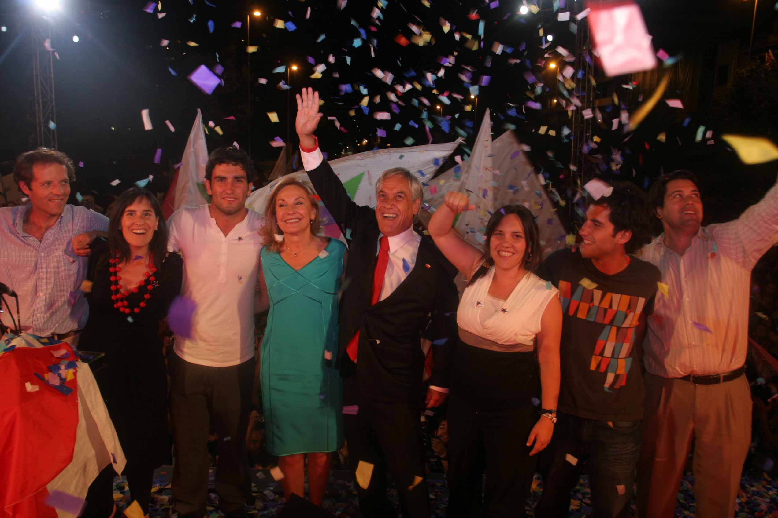 Sebastián Piñera y su familia celebrando su elección como Presidente de Chile.